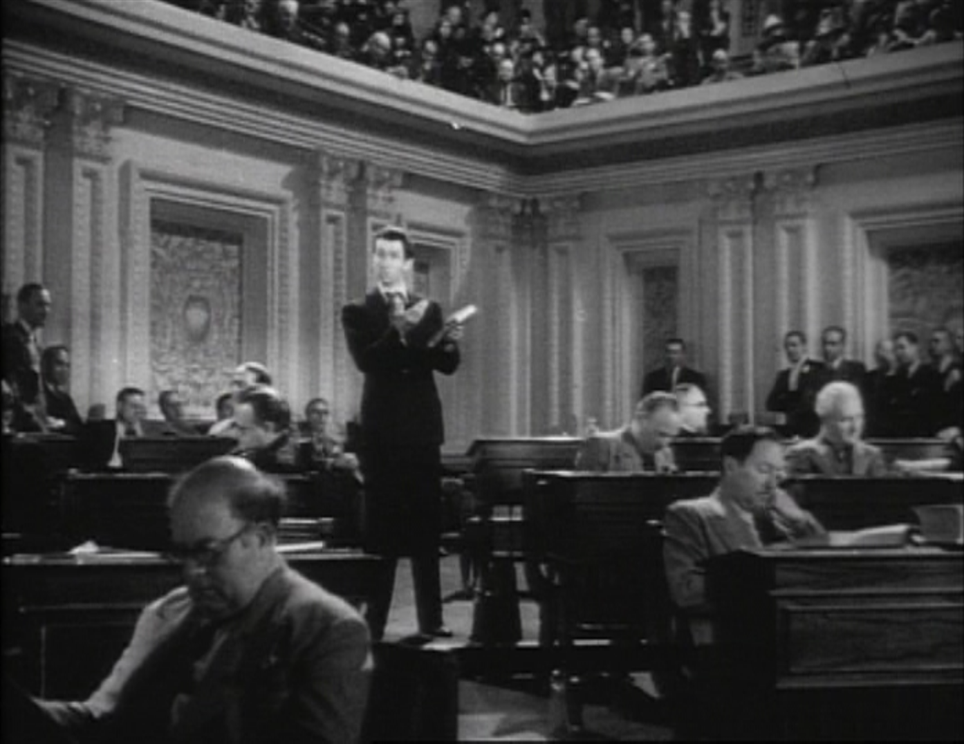 Jeferson Smith's filibuster